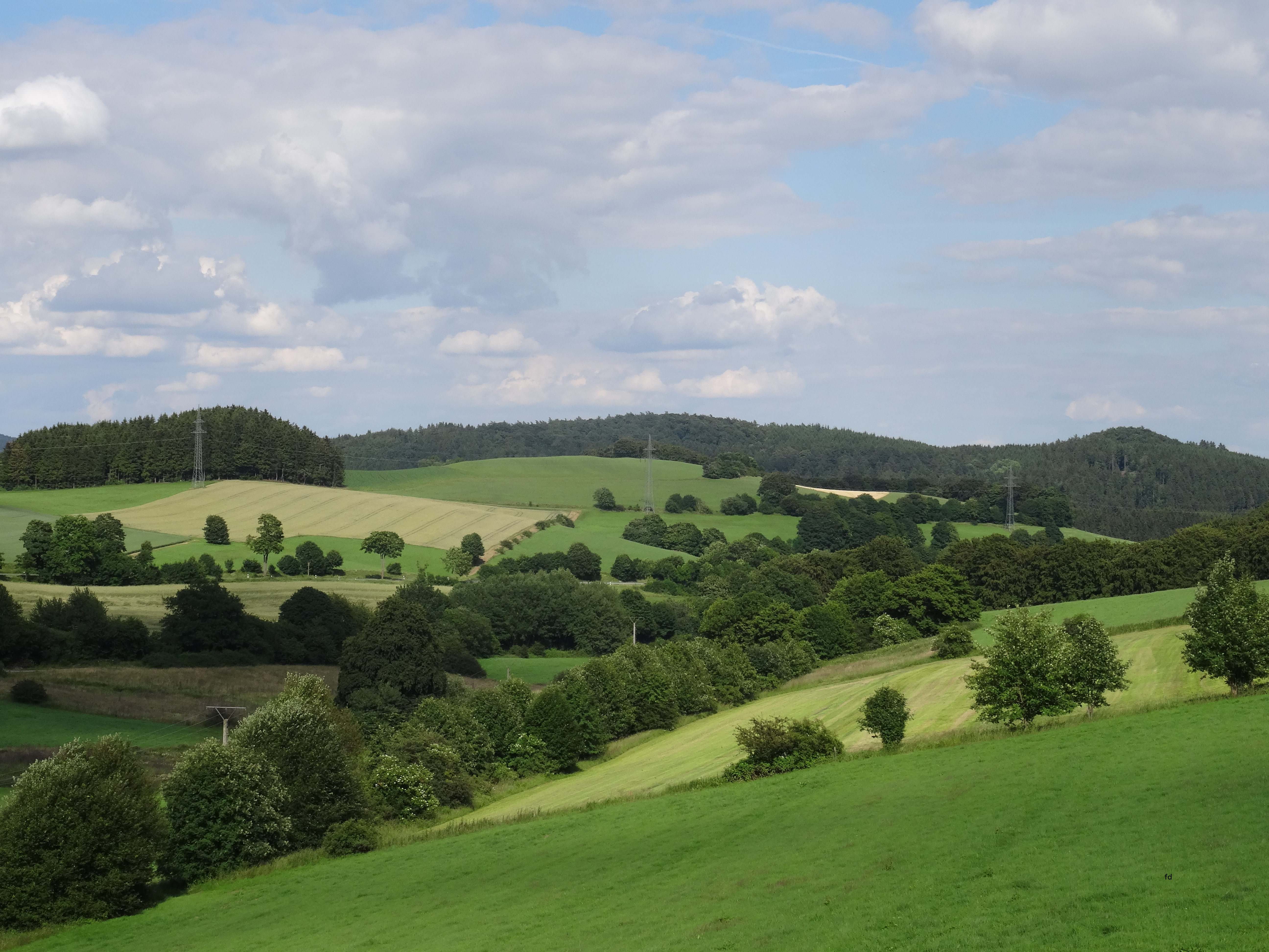 Blick ins Tal der Neerdar